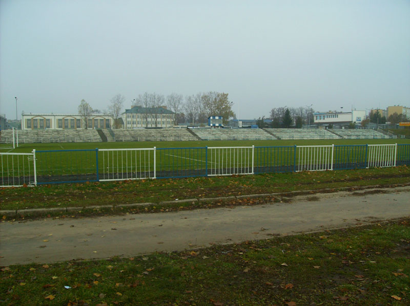 Stadion Olimpii Zambrów